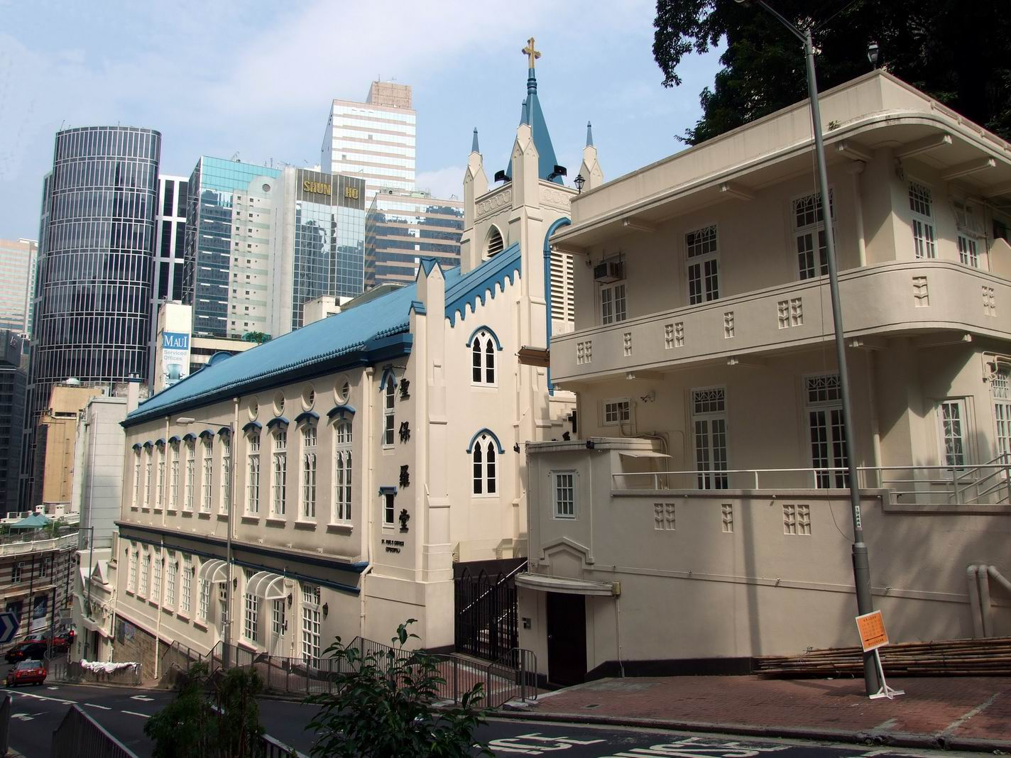 聖保羅堂（前為「雪卿樓」）.